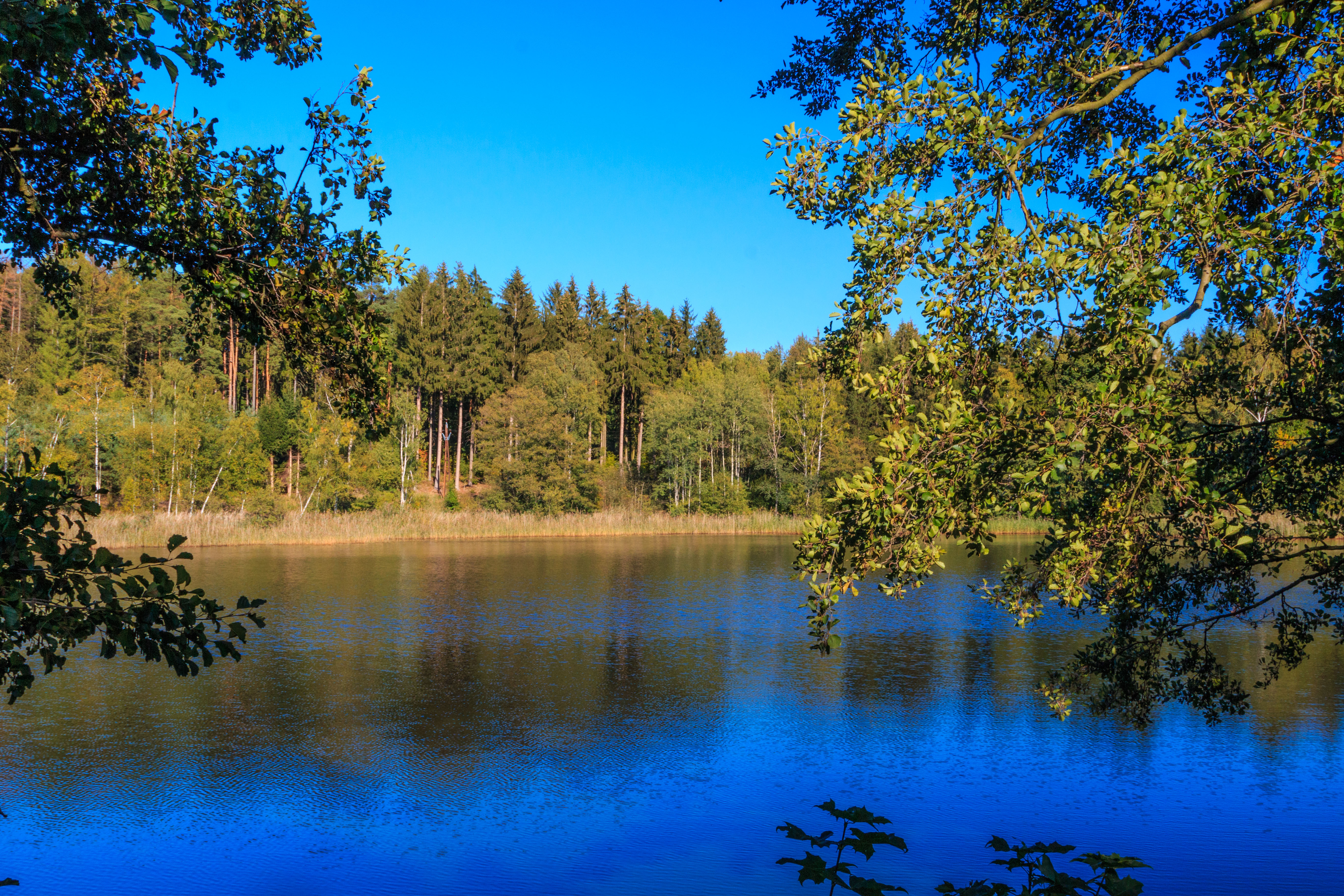 Janovský rybník Project: Vodstvo.